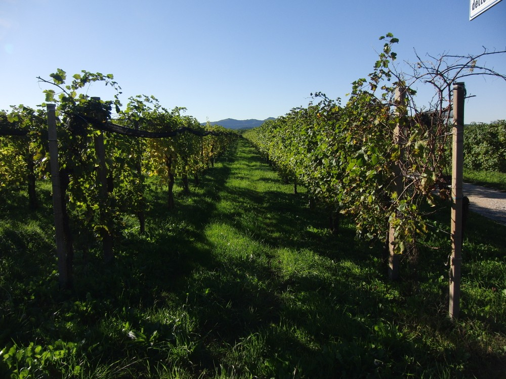 Vigneti di prosecco a Valdobbiadene (Italia)